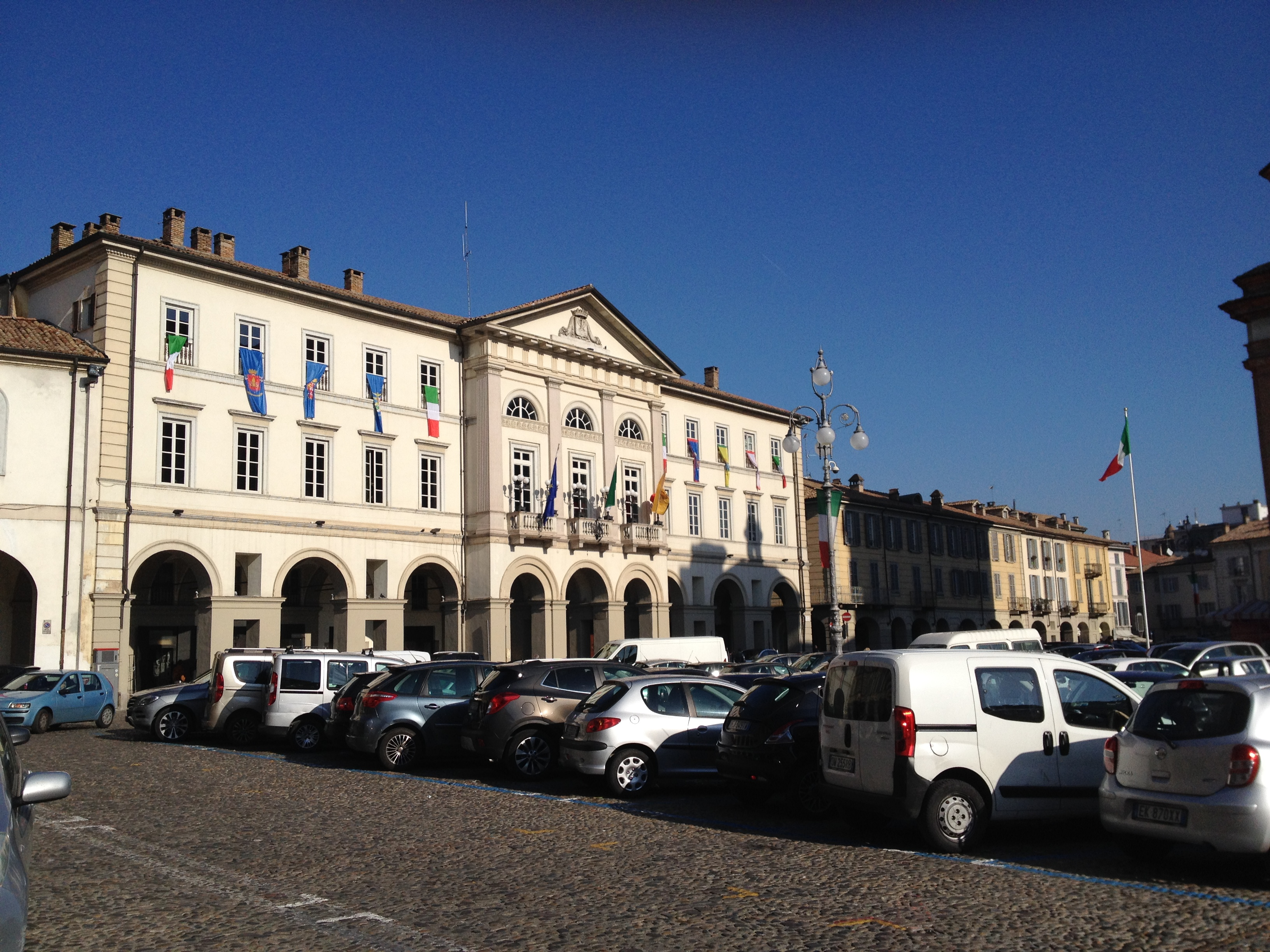 Veduta del palazzo municipale di Voghera (PV)